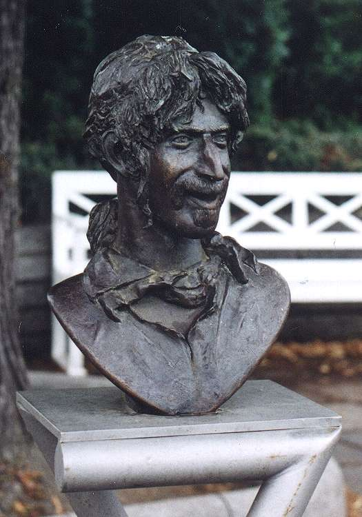 Bildbeschreibung: Frank Zappa-Statue von Vaclav Cesak in Bad Doberan Quelle: selbst fotografiert Fotograf/Zeichner: Hei_ber Datum: 2003 Sonstiges